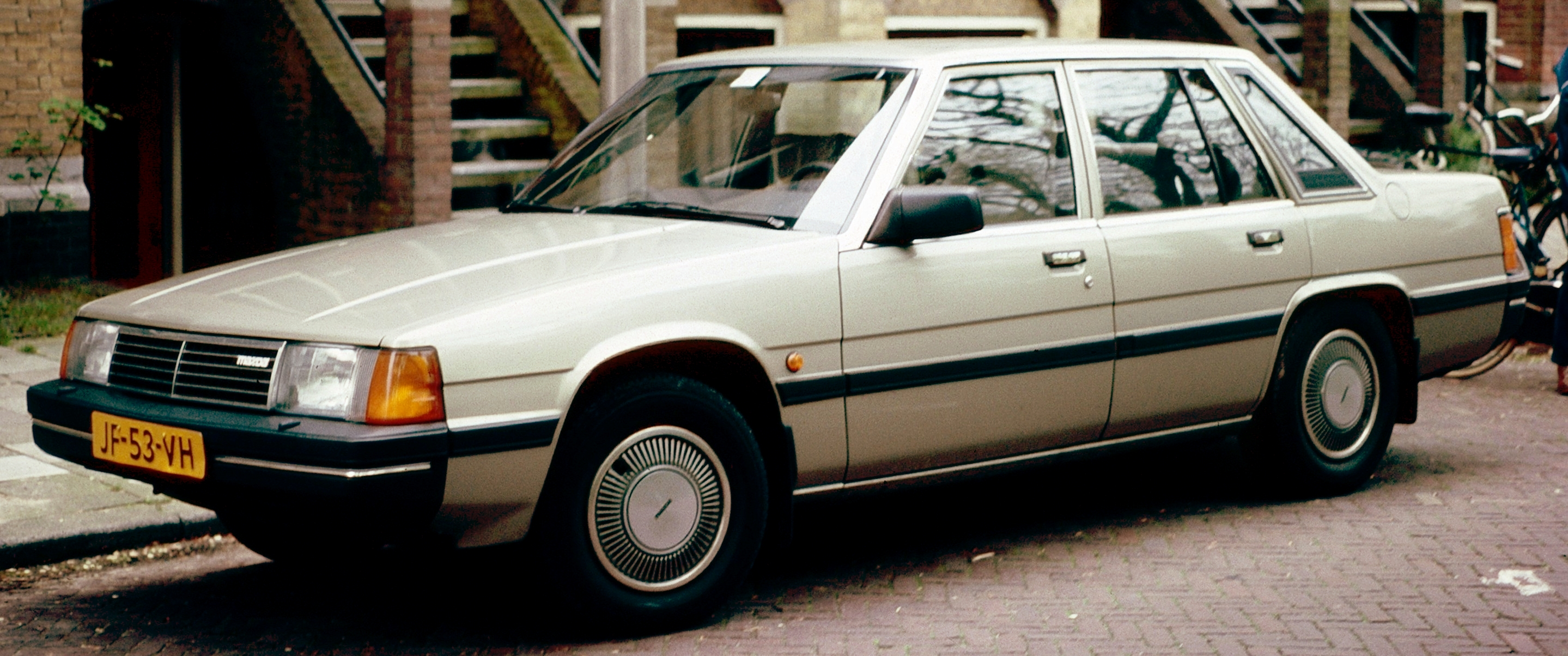 Mazda 929 from NL